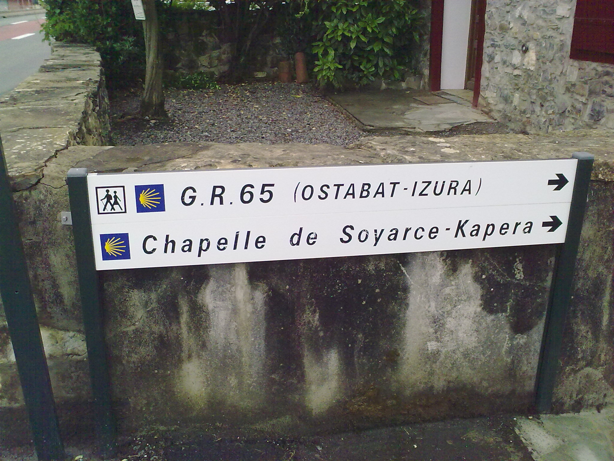 Uhart-Mixe, France